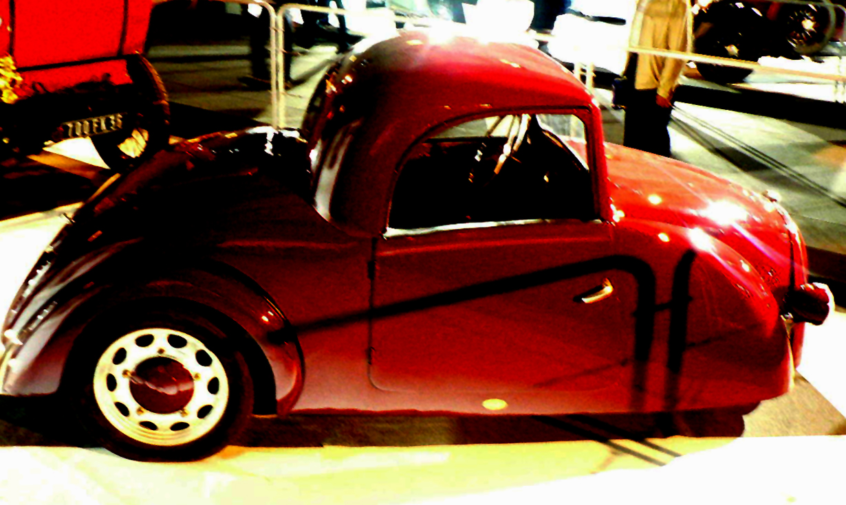 Mondial de l automobile de Paris (October 2006)